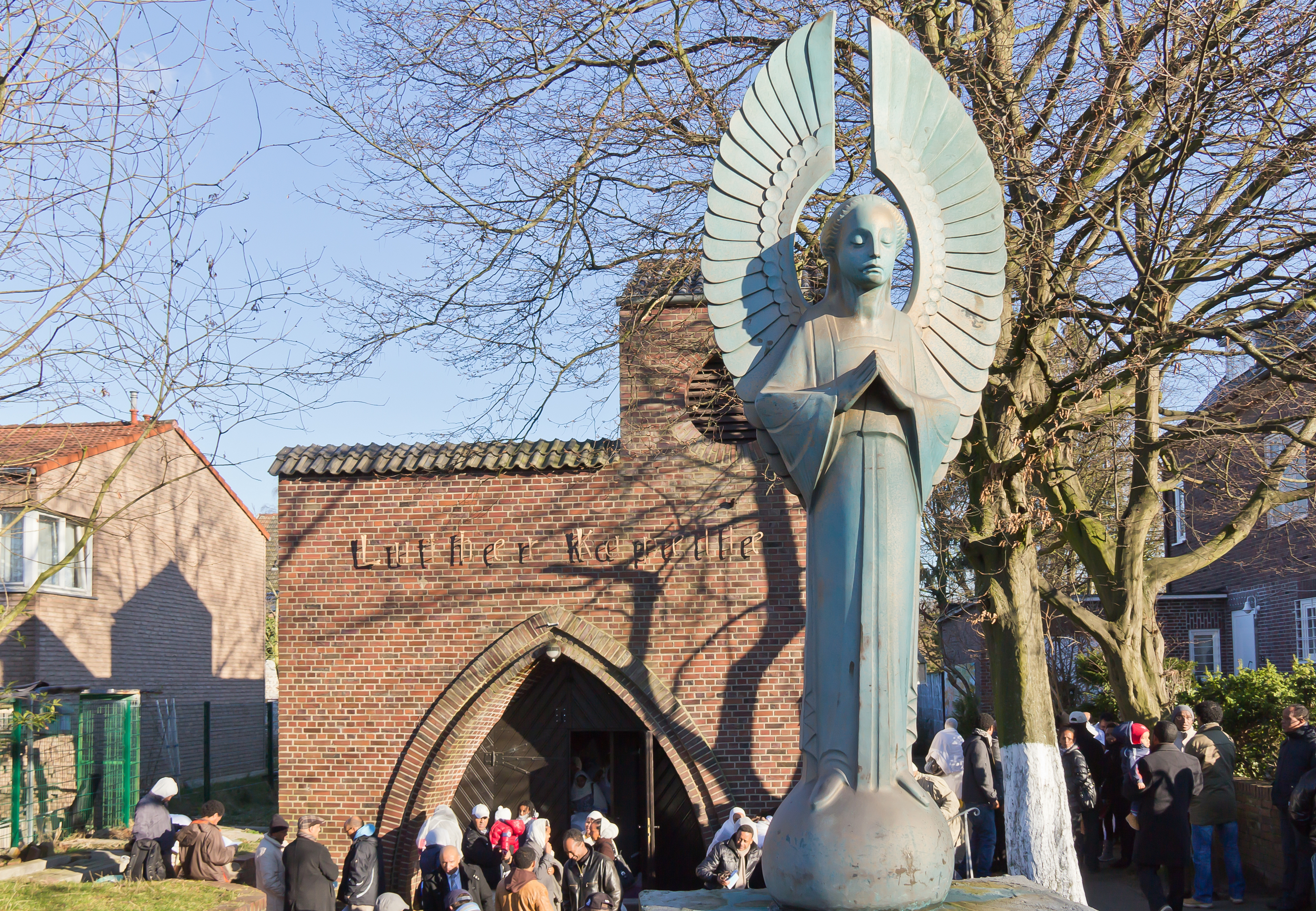 Denkmalgeschützte Luther-Kapelle, seit 2010 Äthiopisch-Orthodoxe St. Michaels-Kirche, Köln-Longerich. Im Vordergrund eine Skulptur des Erzengels Michael des Bildhauers Menser